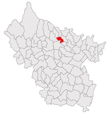 Categorie:Hărţi ale judeţului Buzău